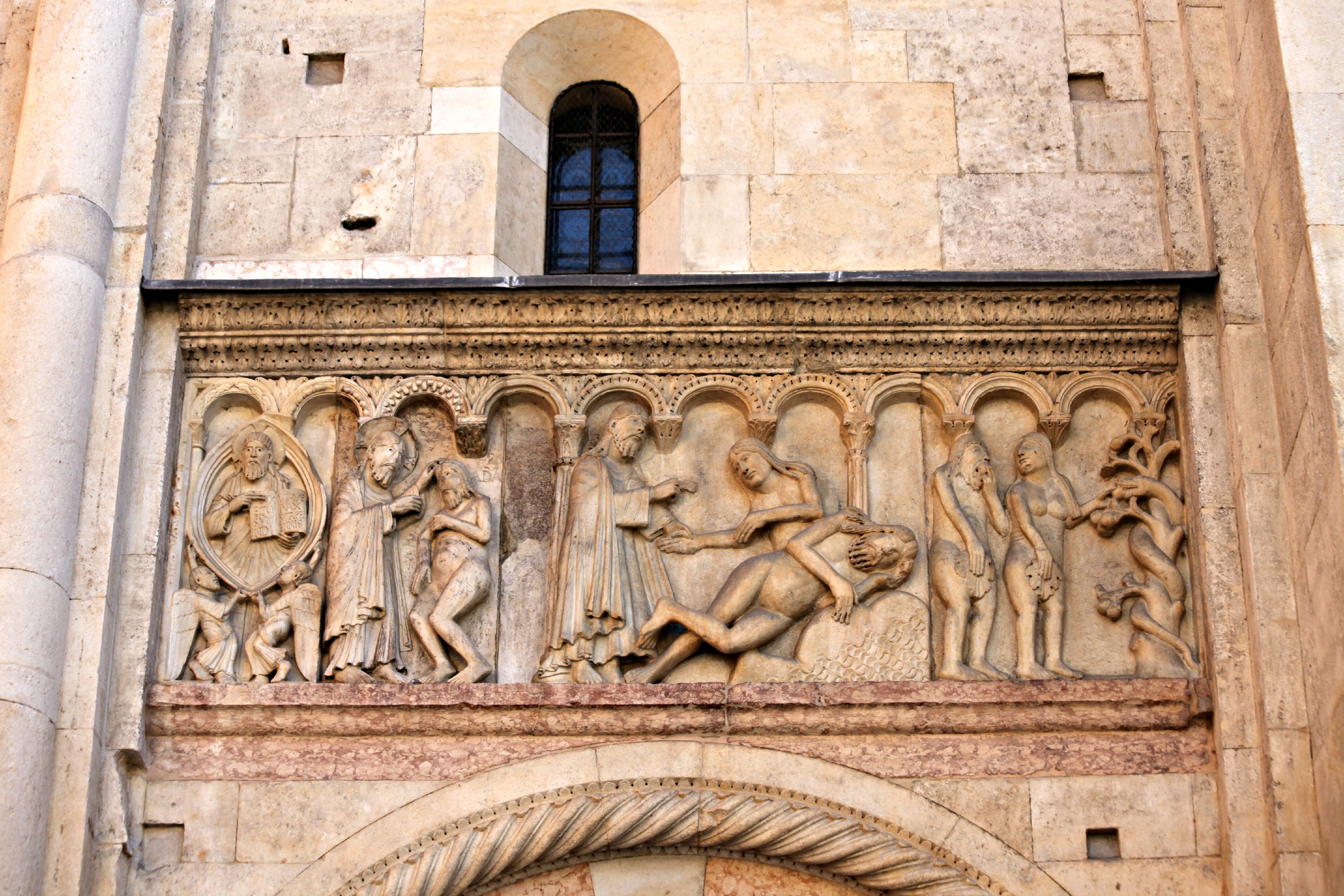 Duomo (solo esterni) This is a photo of a monument which is part of cultural heritage of Italy.